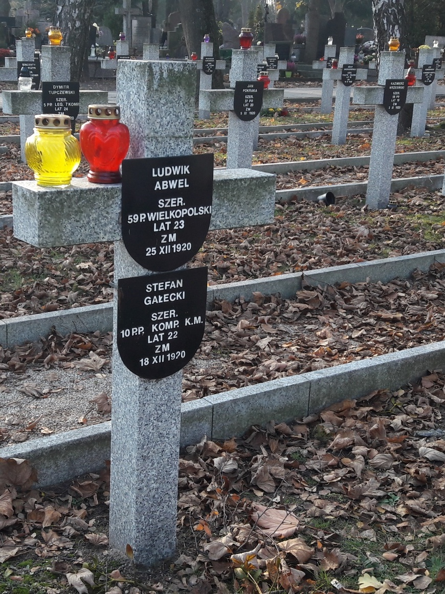 Cmentarz Wojskowy na Powązkach - grób Ludwika Abwela z 59 Pułku Piechoty Wielkopolskiej i Stefana Gałeckiego z 10 pułku piechoty z 1920 roku